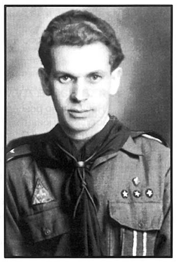 Фото засновинка куреня Хмельниченки Якова Щегрина